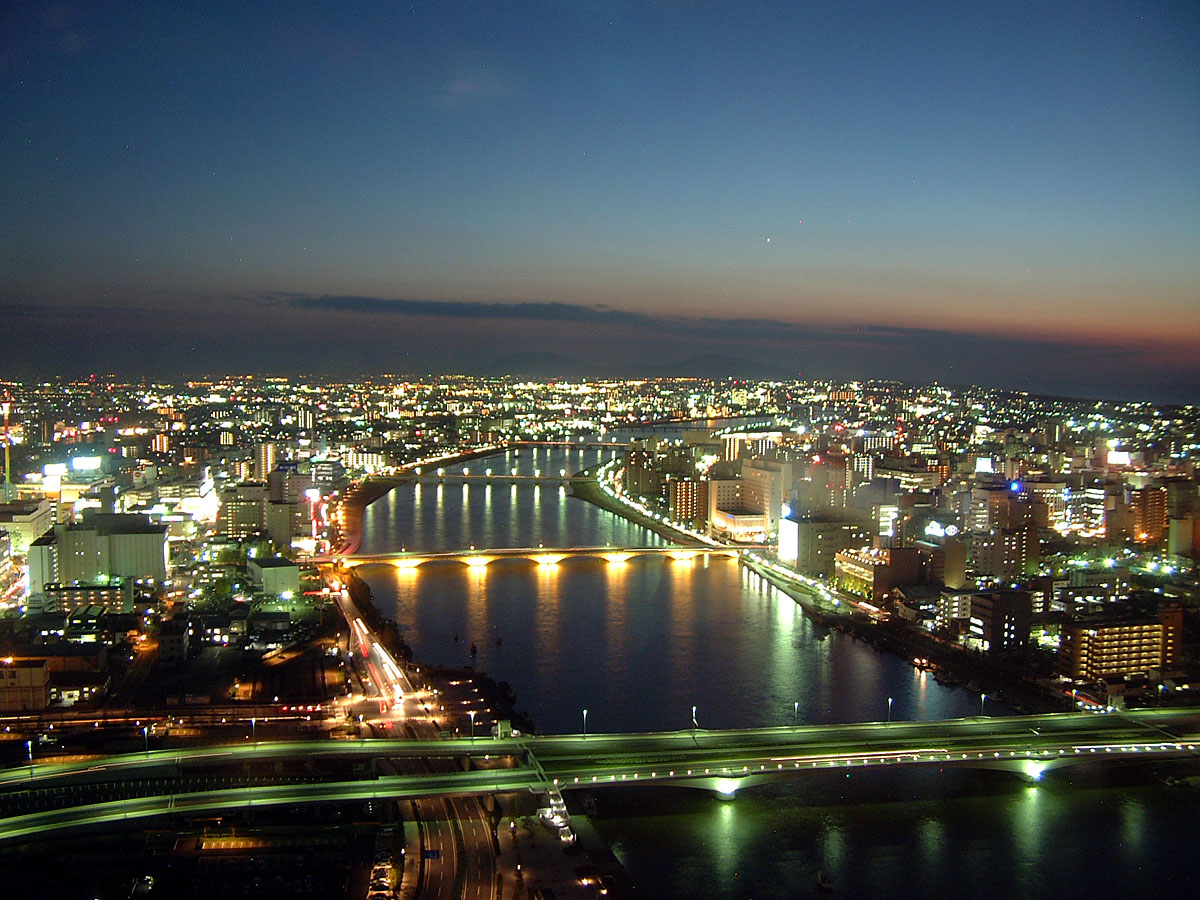 朱鷺メッセ展望室から信濃川上流方面の夜景。ライトアップされた架橋は手前より柳都大橋、萬代橋(ばんだいばし)、八千代橋、昭和大橋。奥には弥彦山(左)、角田山(右)を望む。